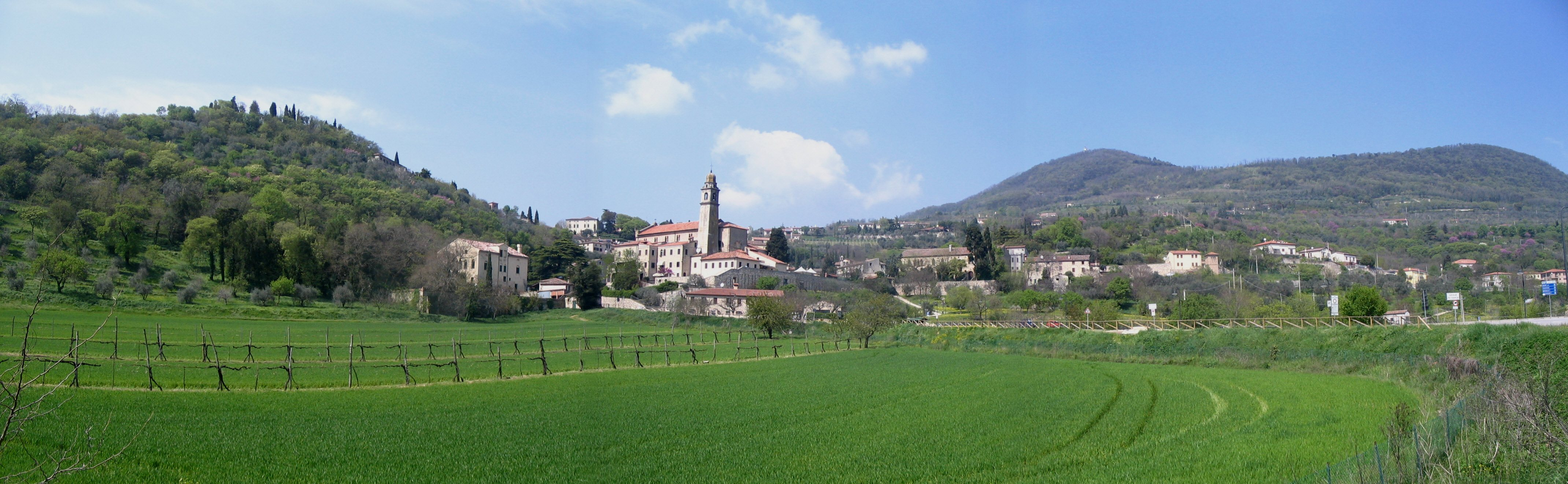 Arquà Petrarca - Venetie - Italie - Eglise Santa Maria - Monte Ventolone